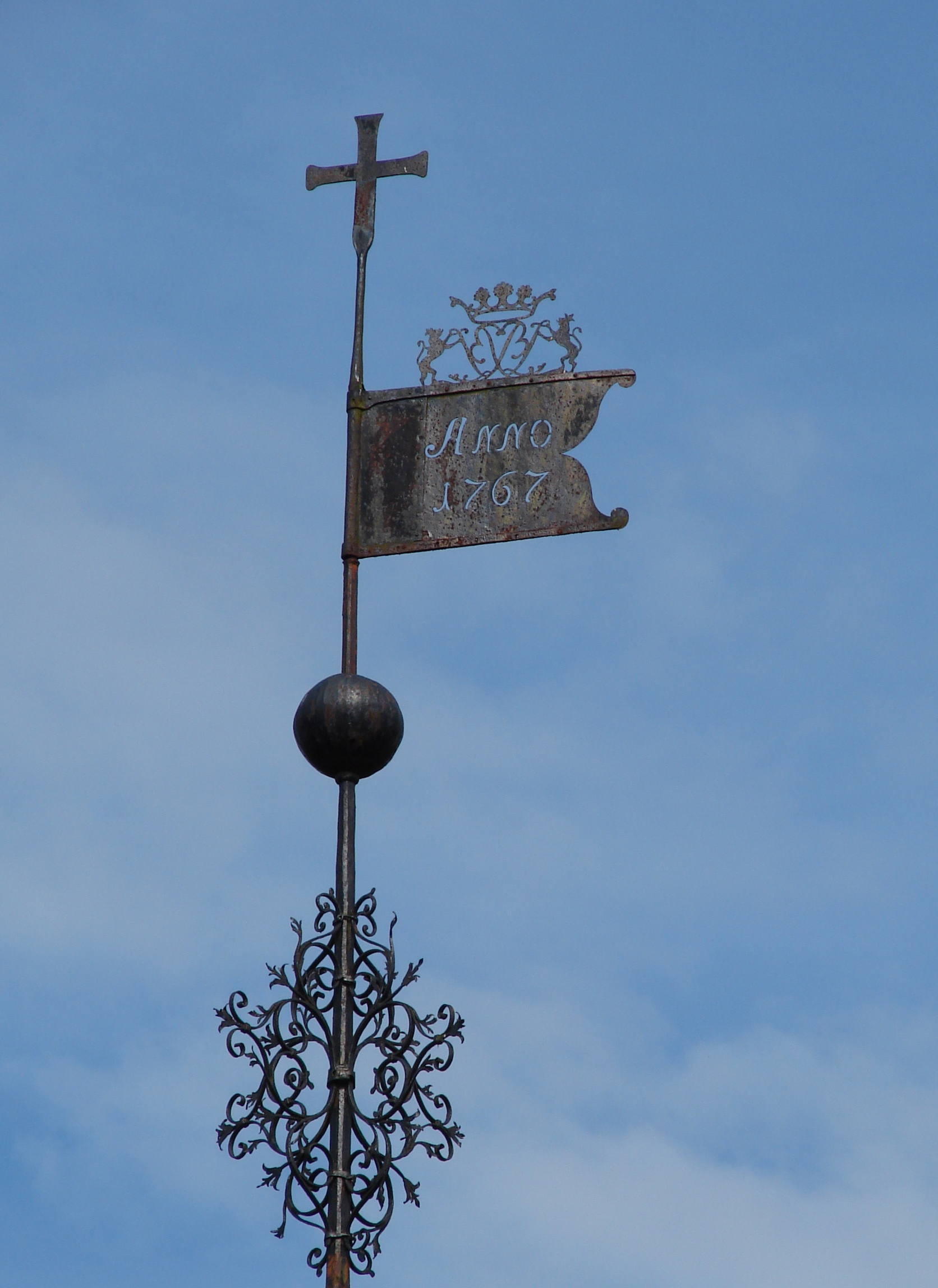 Tårnspir fra Mælum Kirke, Telemark